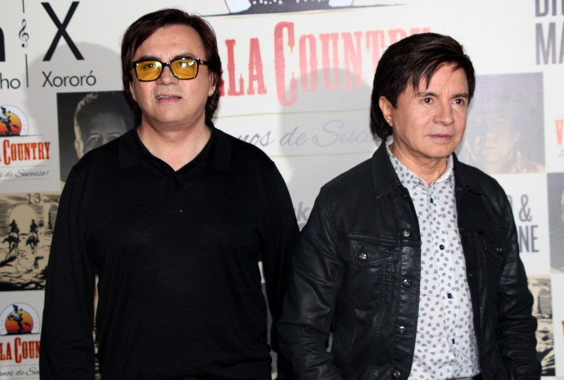 Chitãozinho e Xororo-001